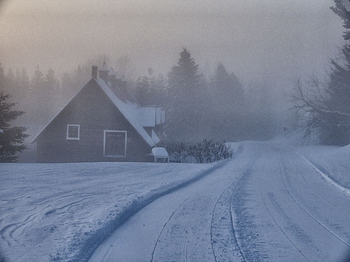 Sur le parc linéaire, l'un des plus beaux coins de Rivière-Rouge.